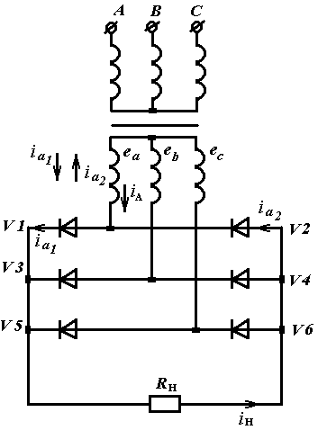 Трифазна мостова схема випрямлення